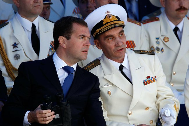 На параде боевых кораблей в честь Дня Военно-Морского Флота. С Главнокомандующим Военно-Морским Флотом России адмиралом Владимиром Высоцким.